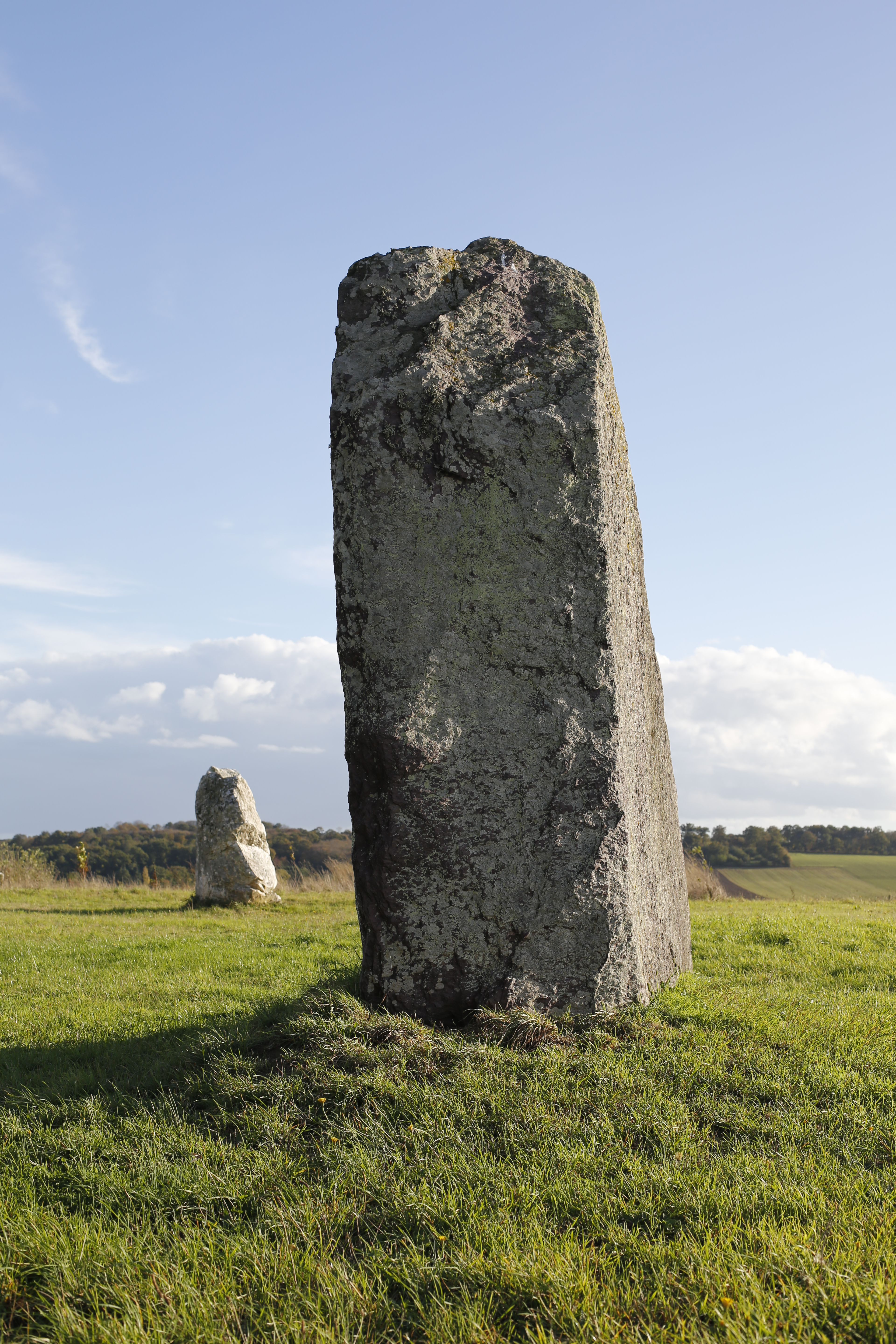 Menhir du Champ de la Pierre et menhir du Champ Horel (Le Sel-de-Bretagne, Ille-et-Vilaine, Bretagne, France).